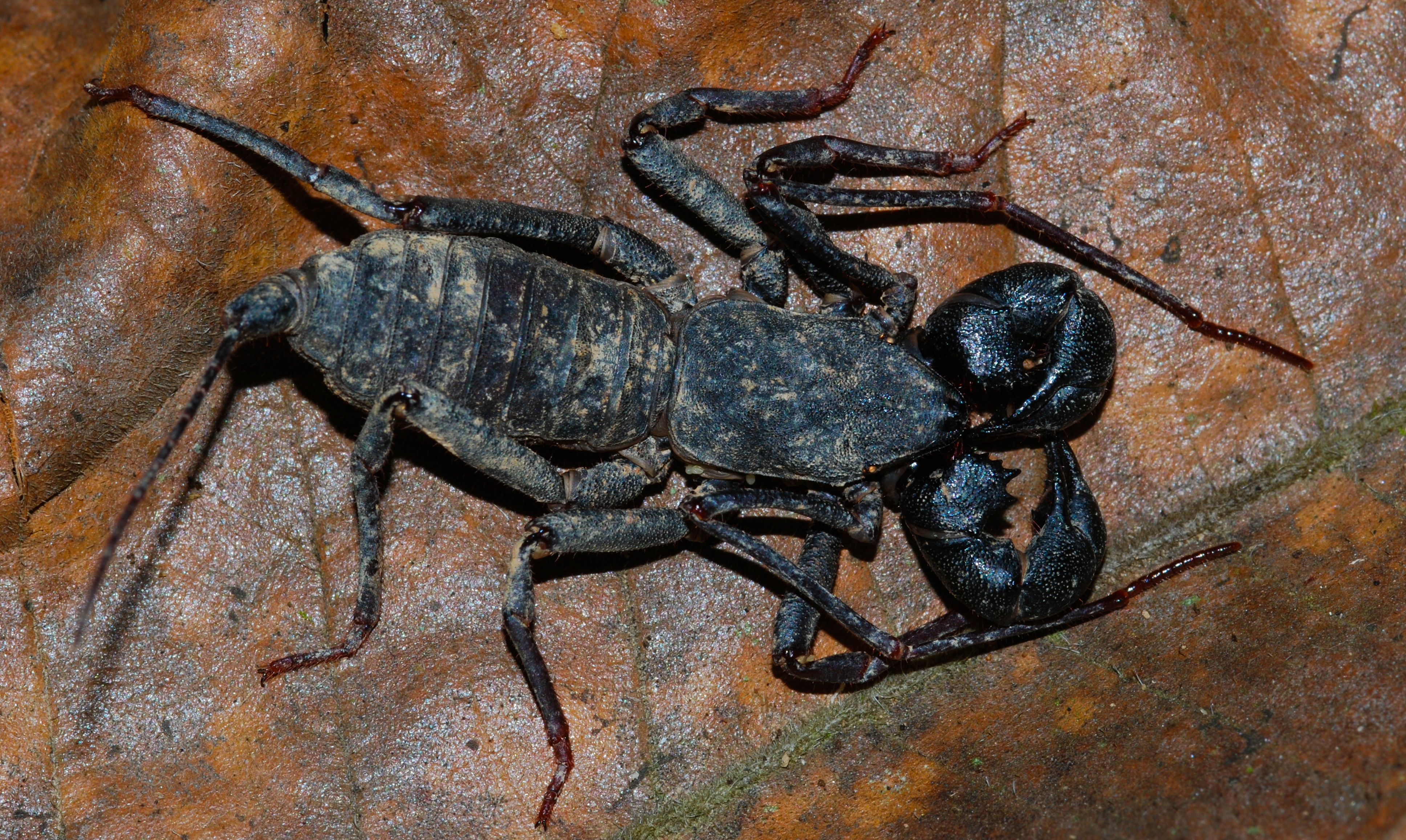 Taman Negara NP, Pahang, MALAYSIA